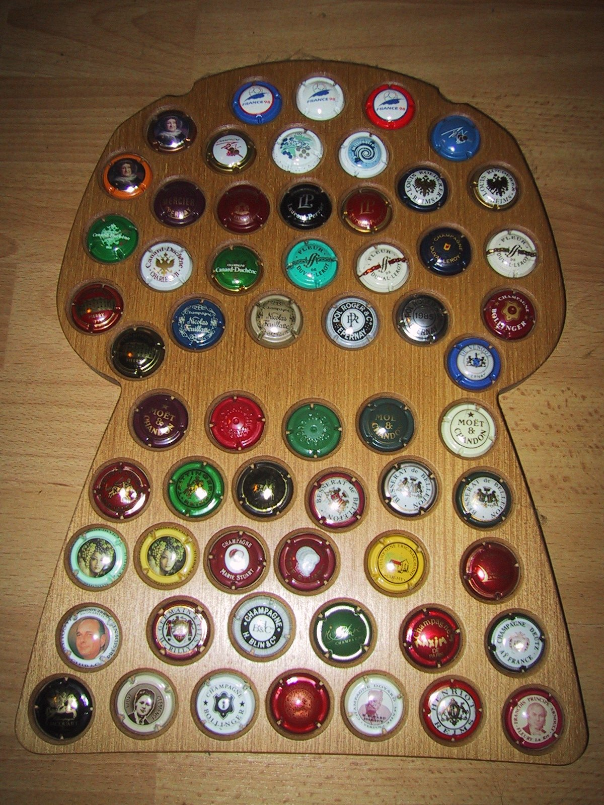 Capsules de muselets de champagne.